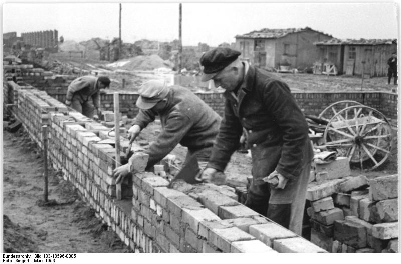 Zentralbild-Siegert, 4.3.1953 Bau von Schweineställen im Volksgut Göhlis. Ein wichtiger Punkt bei der Verbesserung der Ernährung der Werktätigen ist die nach fortschrittlichen Methoden betriebene Schweinezucht. Im Volksgut Göhlis bei Riesa sollen bis zum 10. März 2000 Schweine zur Mästung untergebracht werden. UBz.: Um die notwendige Unterkunft für die Schweine zu haben, werden zur Zeit große Schweineställe gebaut.